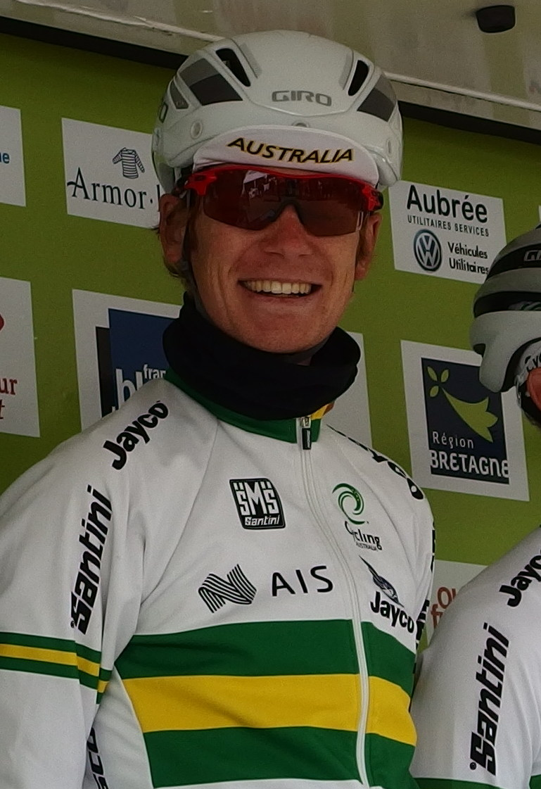 Tour de Bretagne 2015 - Présentation des équipes au départ de la troisième étape à Baud - Équipe nationale d'Australie Depicted person: Jack Haig